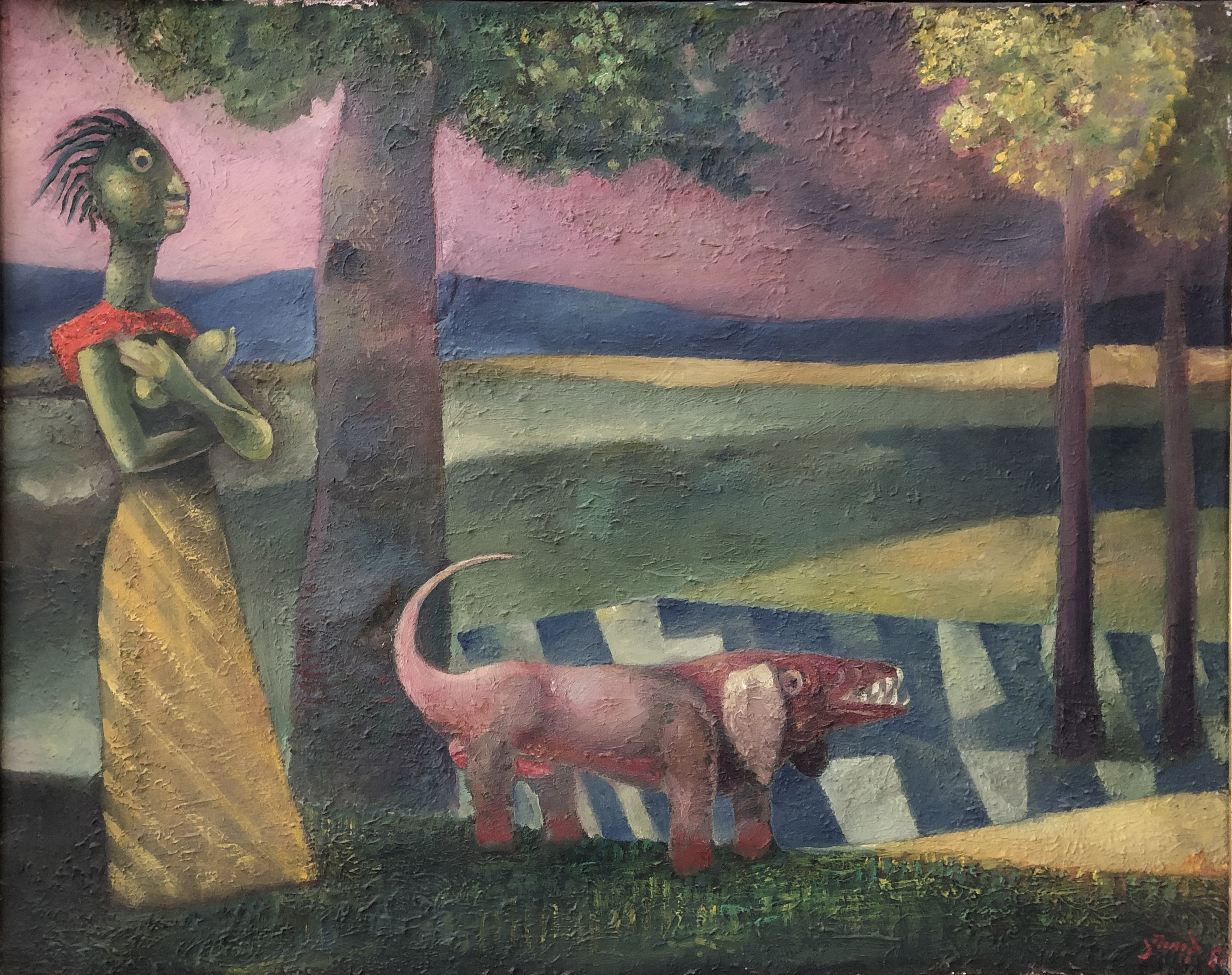 Schilderij van Jacob Ydema 1952